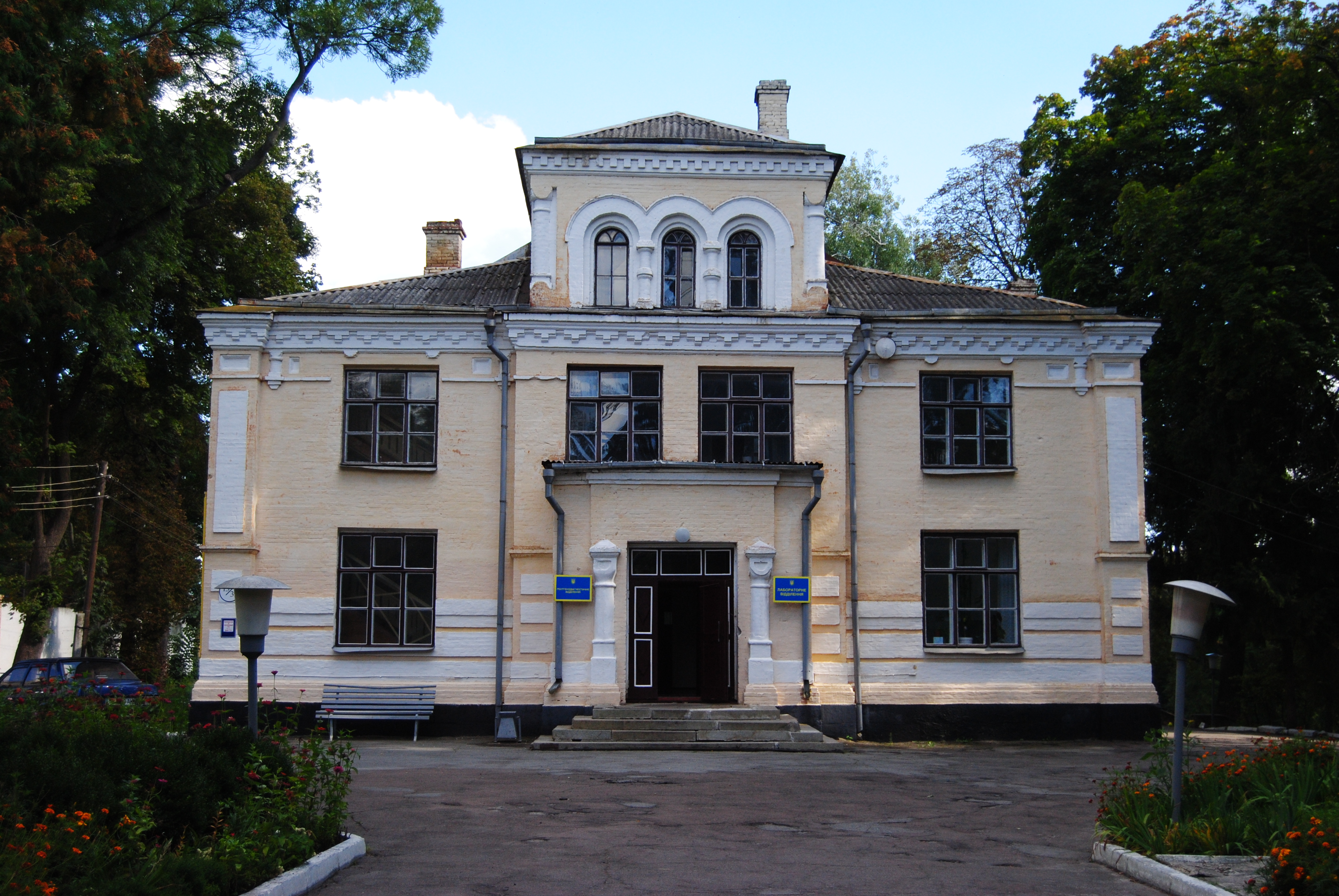 Серафимівська церква, комплекс монастиря Сестер Шаріток, Житомир, вул. Фещенка-Чопівського, 22